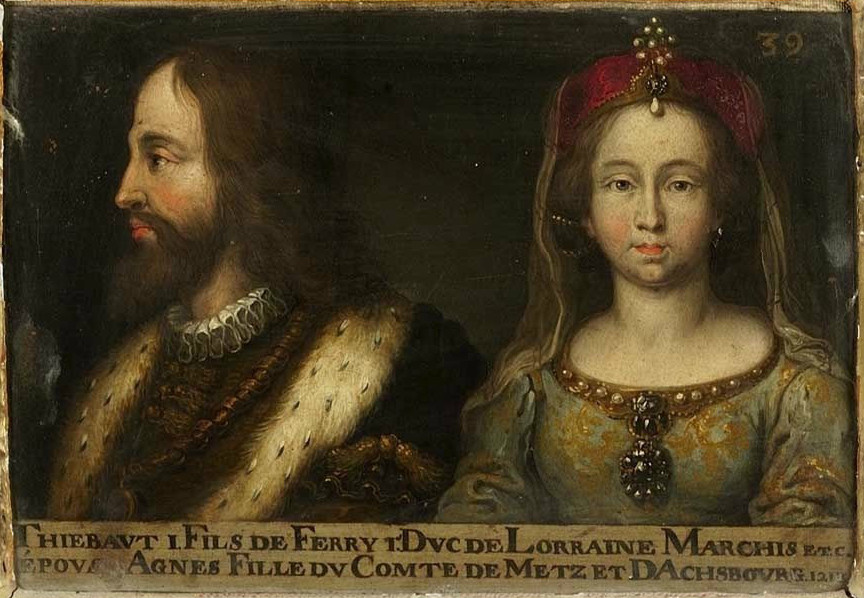 Portrait de Thiébaud Ier, duc de Lorraine de 1213 à 1220, et de son épouse Gertrude de Dabo. Ce tableau fait partie d'une suite d'une soixantaine de double-portraits représentant les ducs et duchesses de Lorraine ainsi que leurs ancêtres supposés. La légende nomme à tort la duchesse Agnès. Musée des Offices, Florence (Inv. 1890, 661)